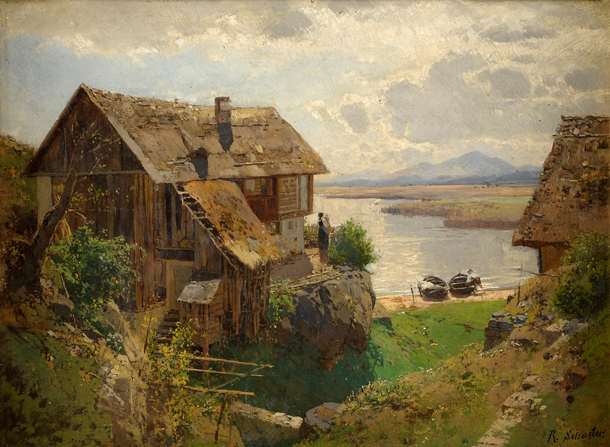 Sommertag am See. Signiert. Öl/Holz, 24 x 32 cm